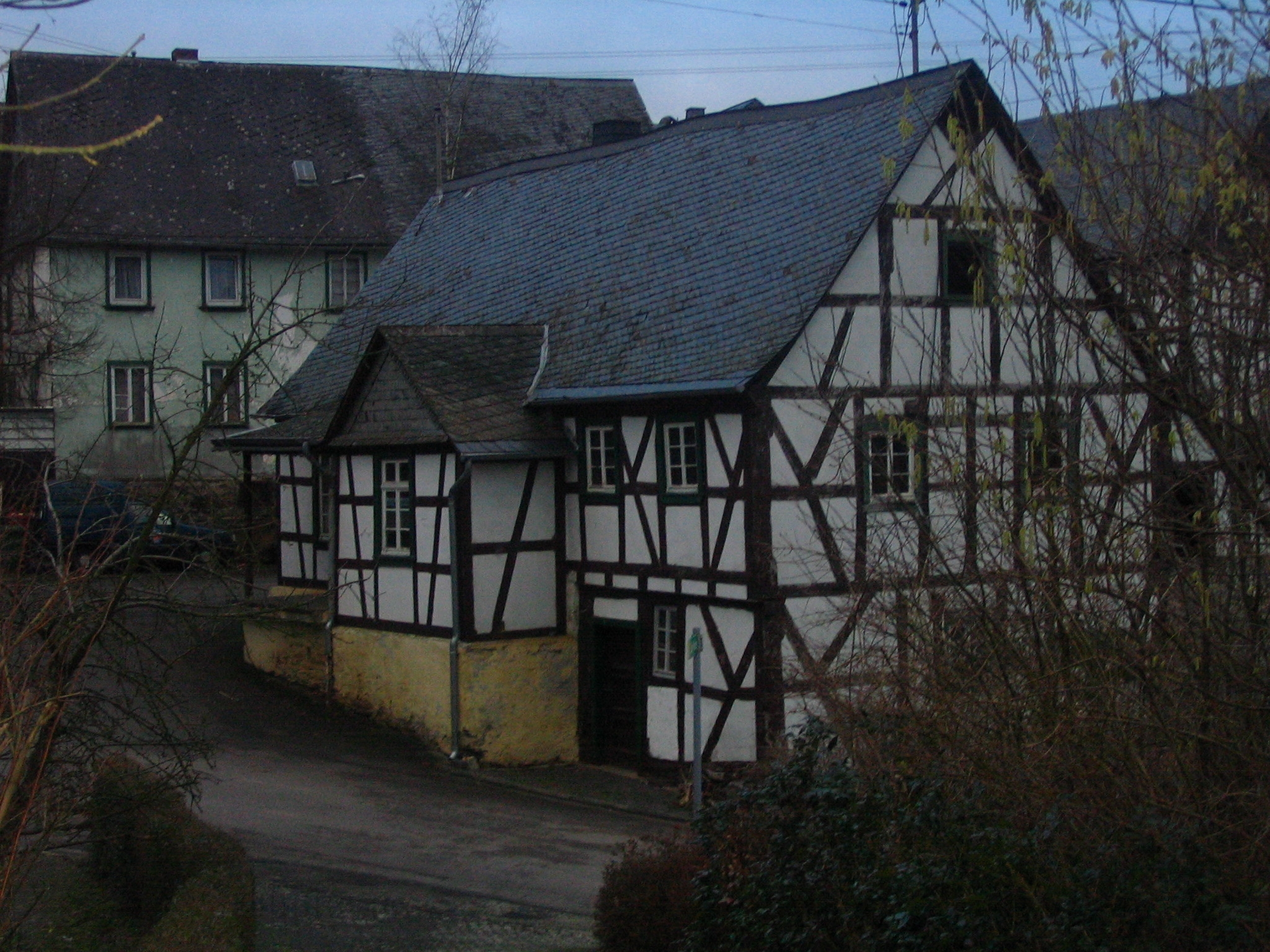 altes Raiffeisenlager Roth im Hunsrück